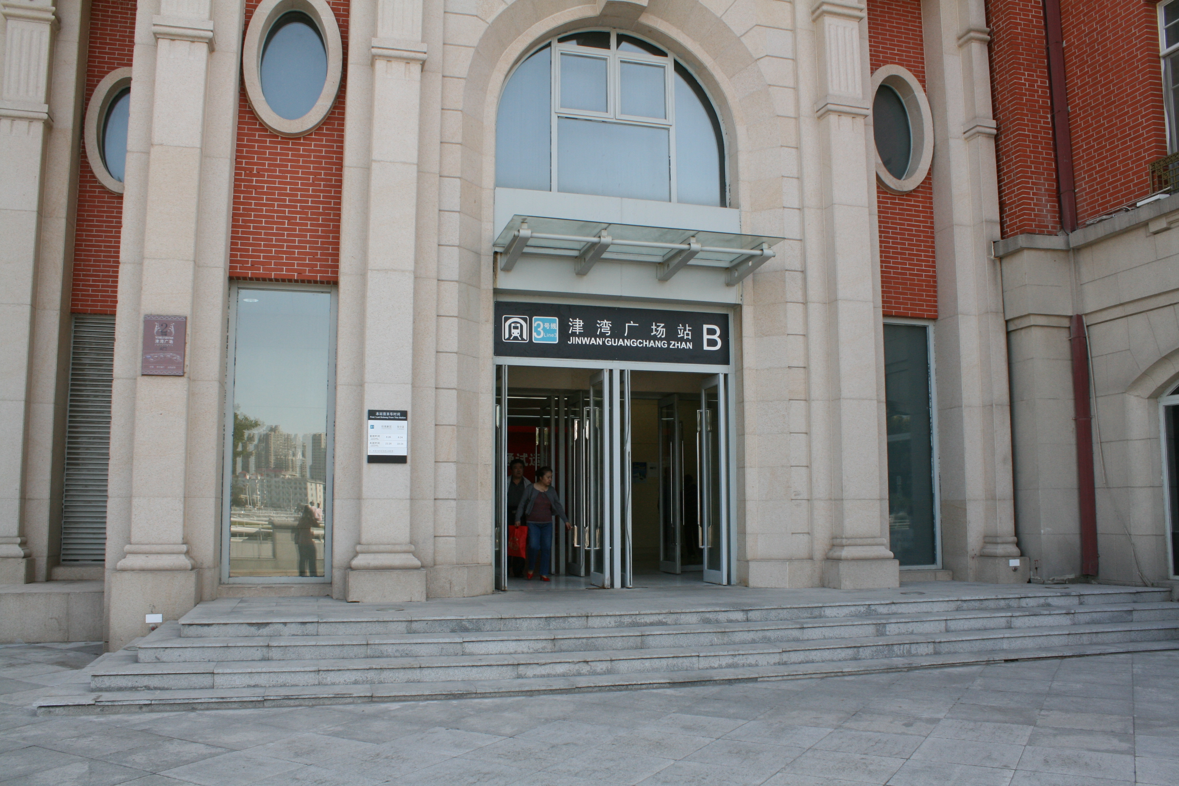 天津地鐵三號線津灣廣場站B出口